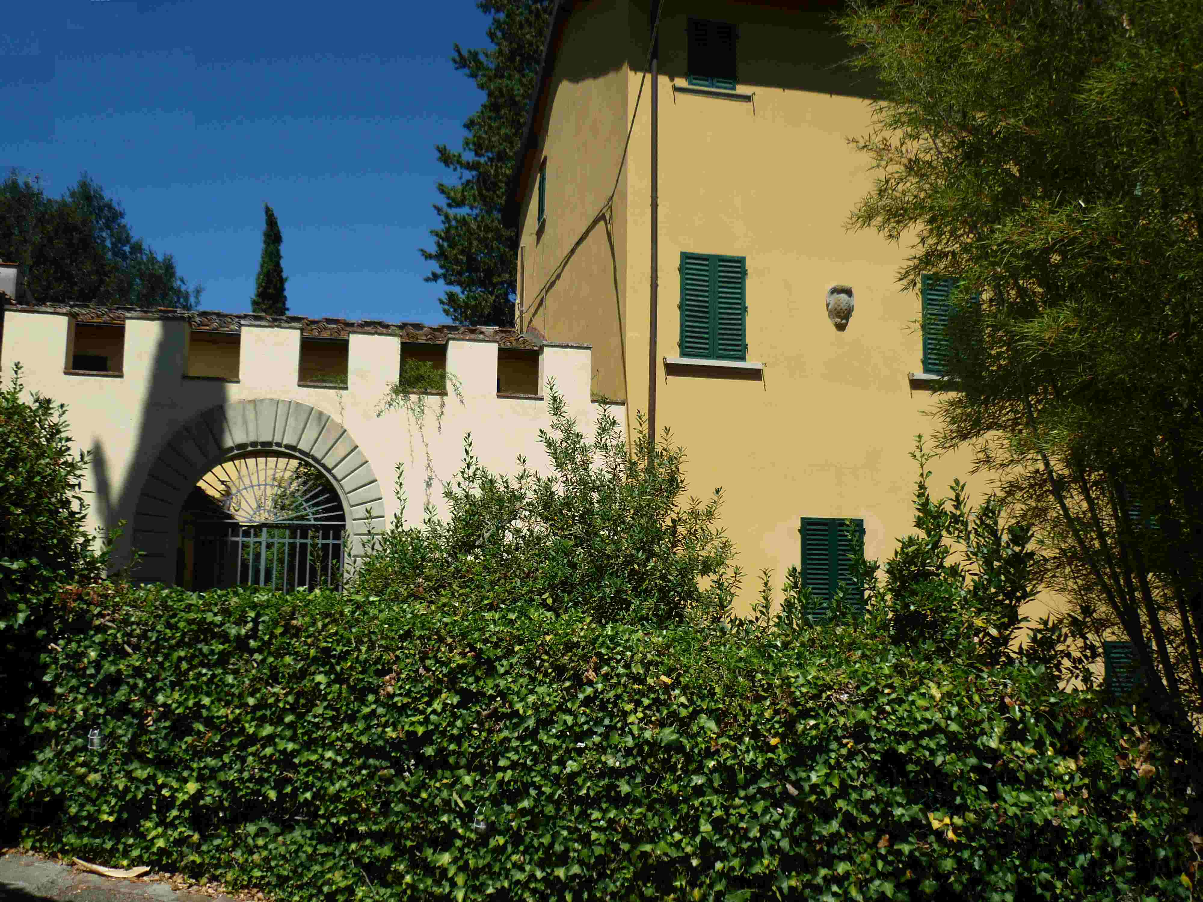 Vista dalla strada